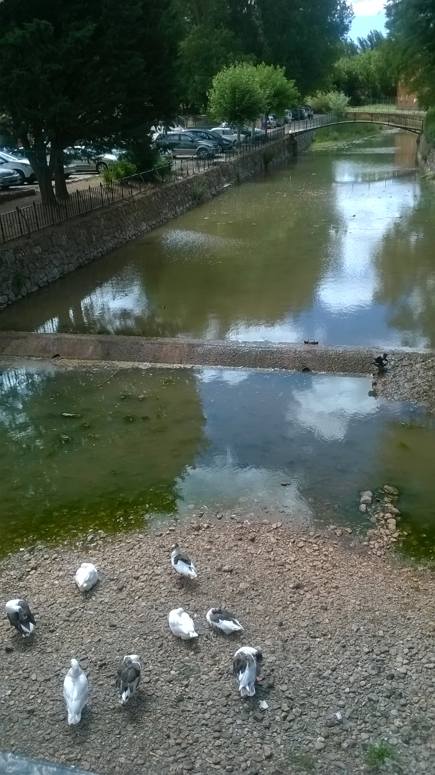 Rio Aguisejo a su paso por Ayllón (Segovia-España)